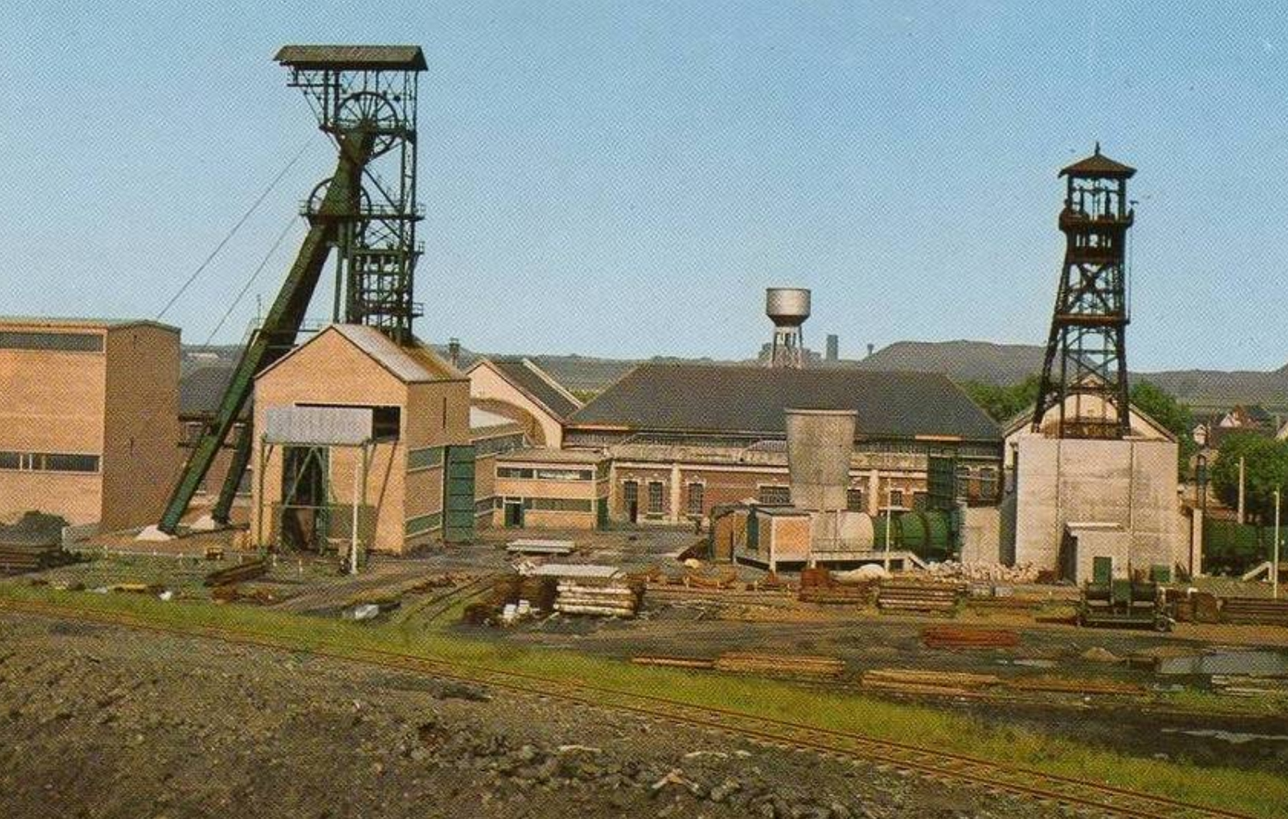 La Fosse n° 8 - 8 bis de la Compagnie des mines de Dourges était un charbonnage constitué de deux puits situé à Évin-Malmaison, Pas-de-Calais, Nord-Pas-de-Calais, France.